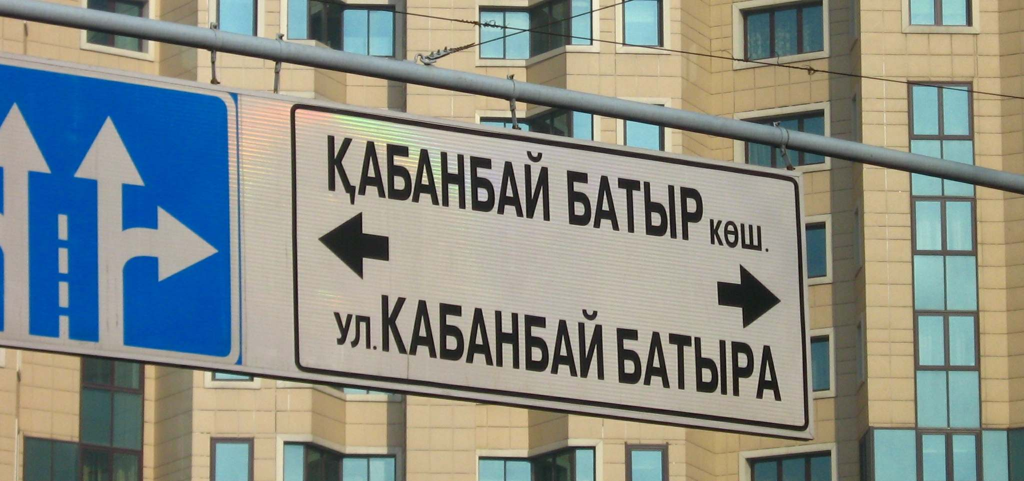 Алма-Ата. Дорожный указатель "Улица Кабанбай батыра" на казахском и русском языках